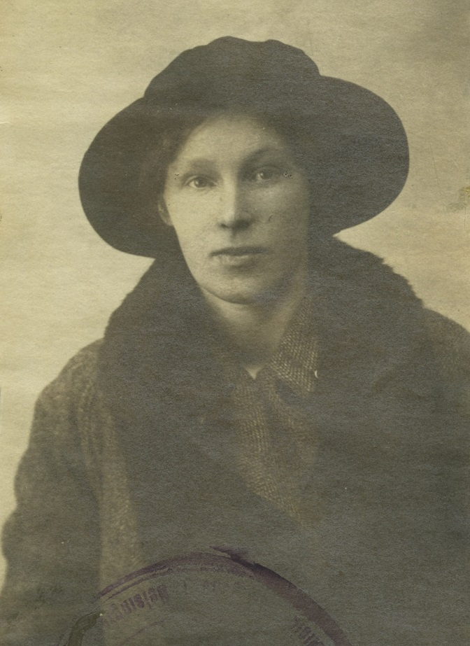 Anna Wiik (1891-1964), finländsk folkbildare